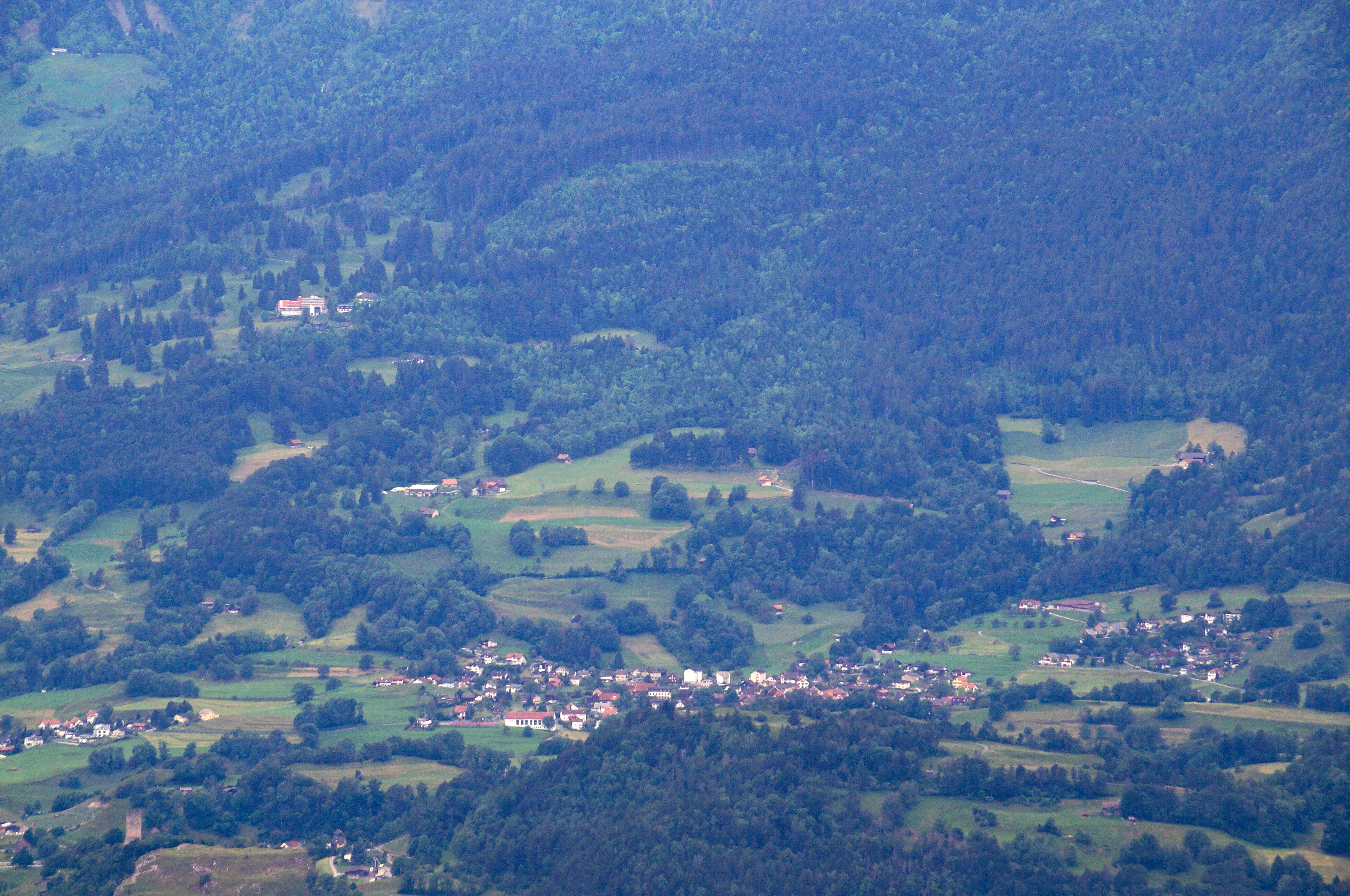 Oberschan und Hotel Alvier auf Malanser Holz von Liechtenstein aus gesehen